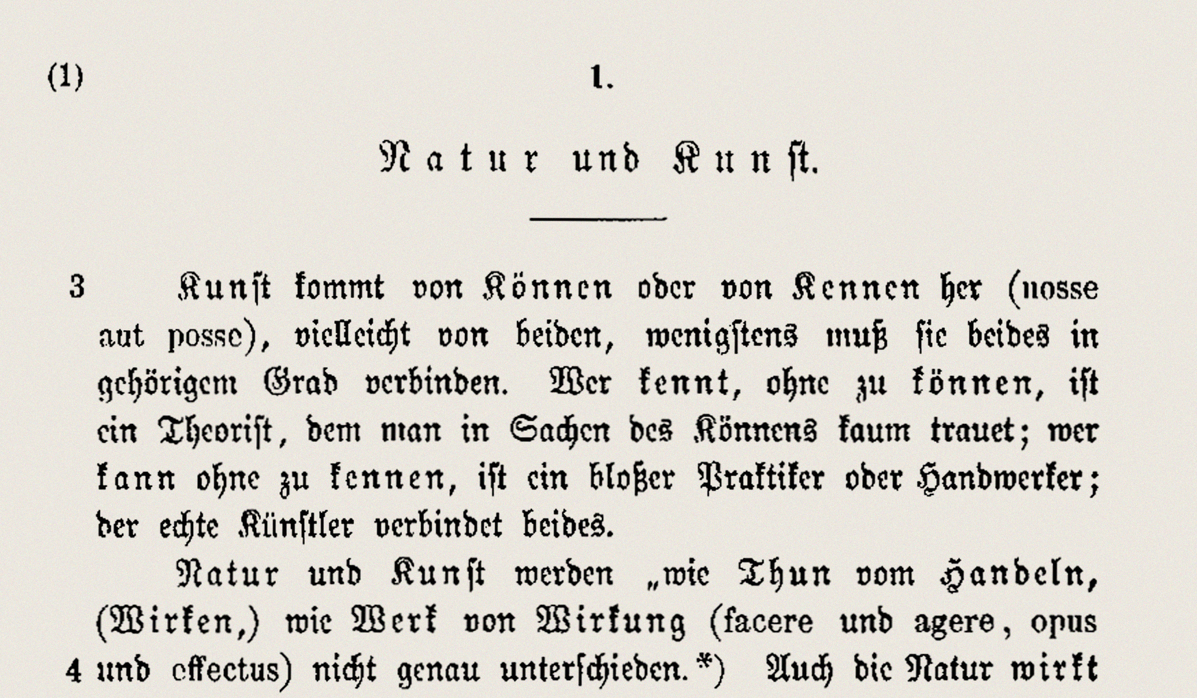 Ausschnitt aus: Johann Gottfried Herder: Kalligone,Band 2, Kaptel 1, in: Sämmtliche Werke, hrsg. v. B. Suphan, Bd. XXII, Berlin 1880, S. 125.